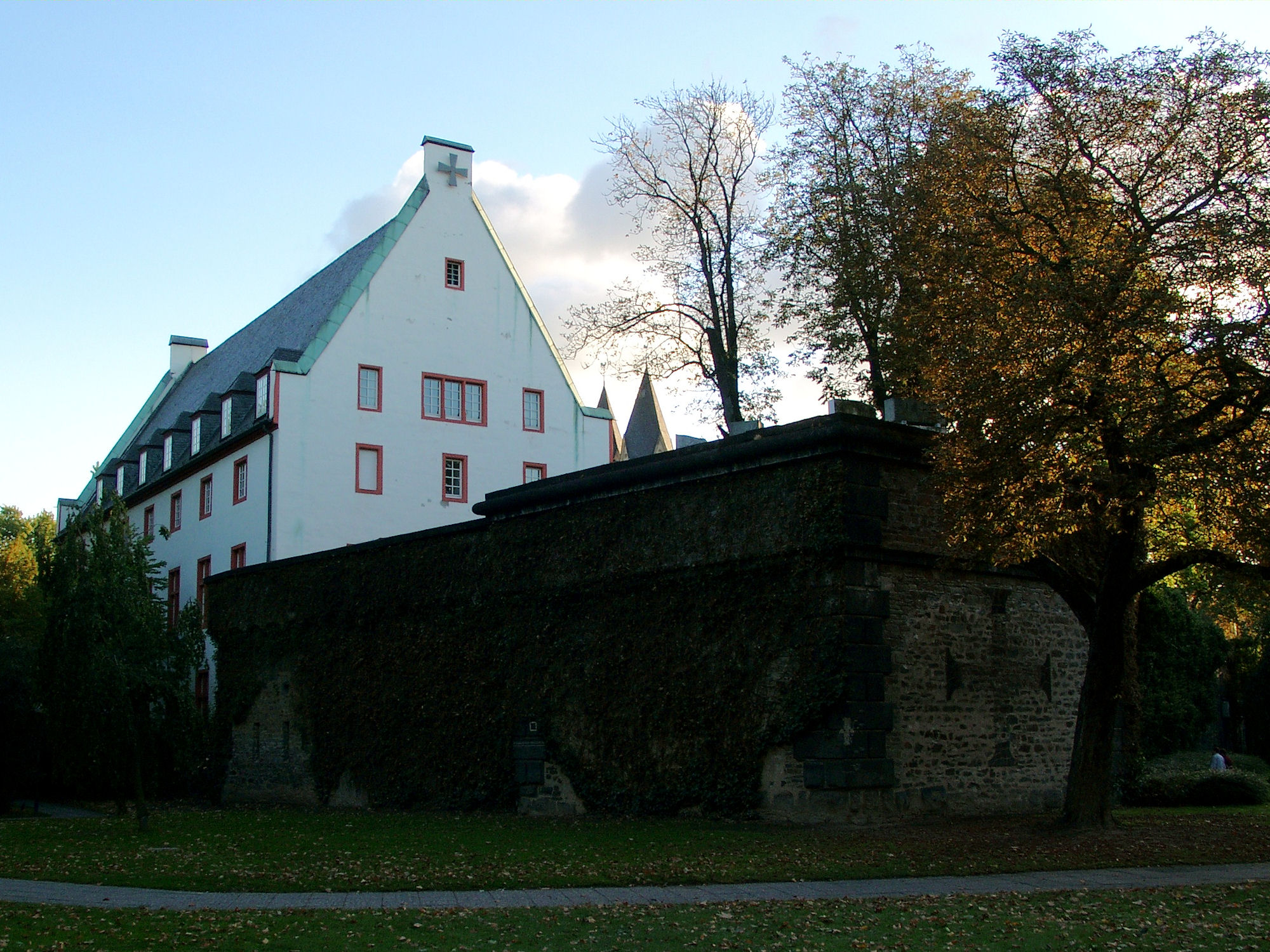 Das eigentliche Deutsche Eck in Koblenz – Deutschherrenhaus mit dem Kreuz des Deutschen Ordens